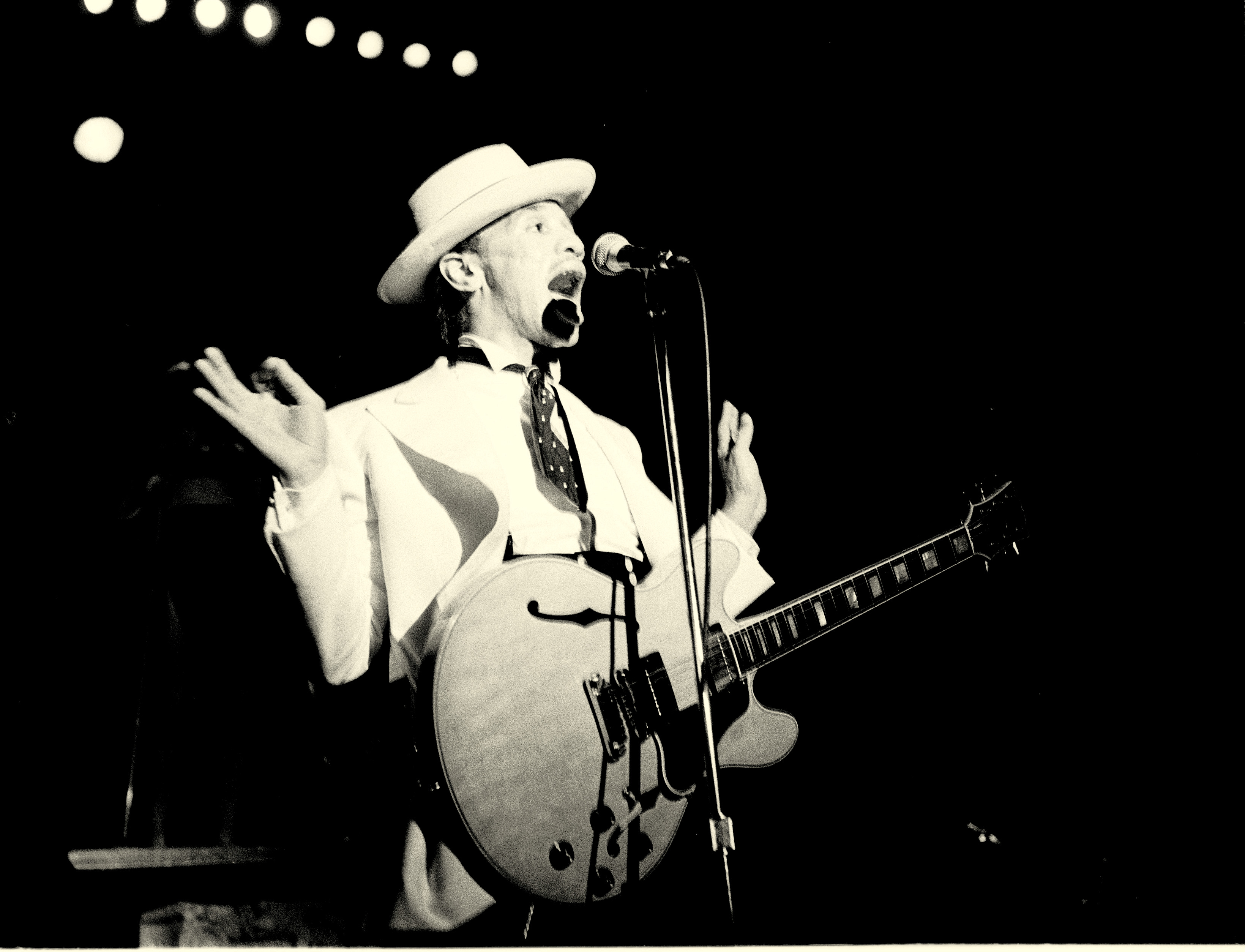 Kid Creole